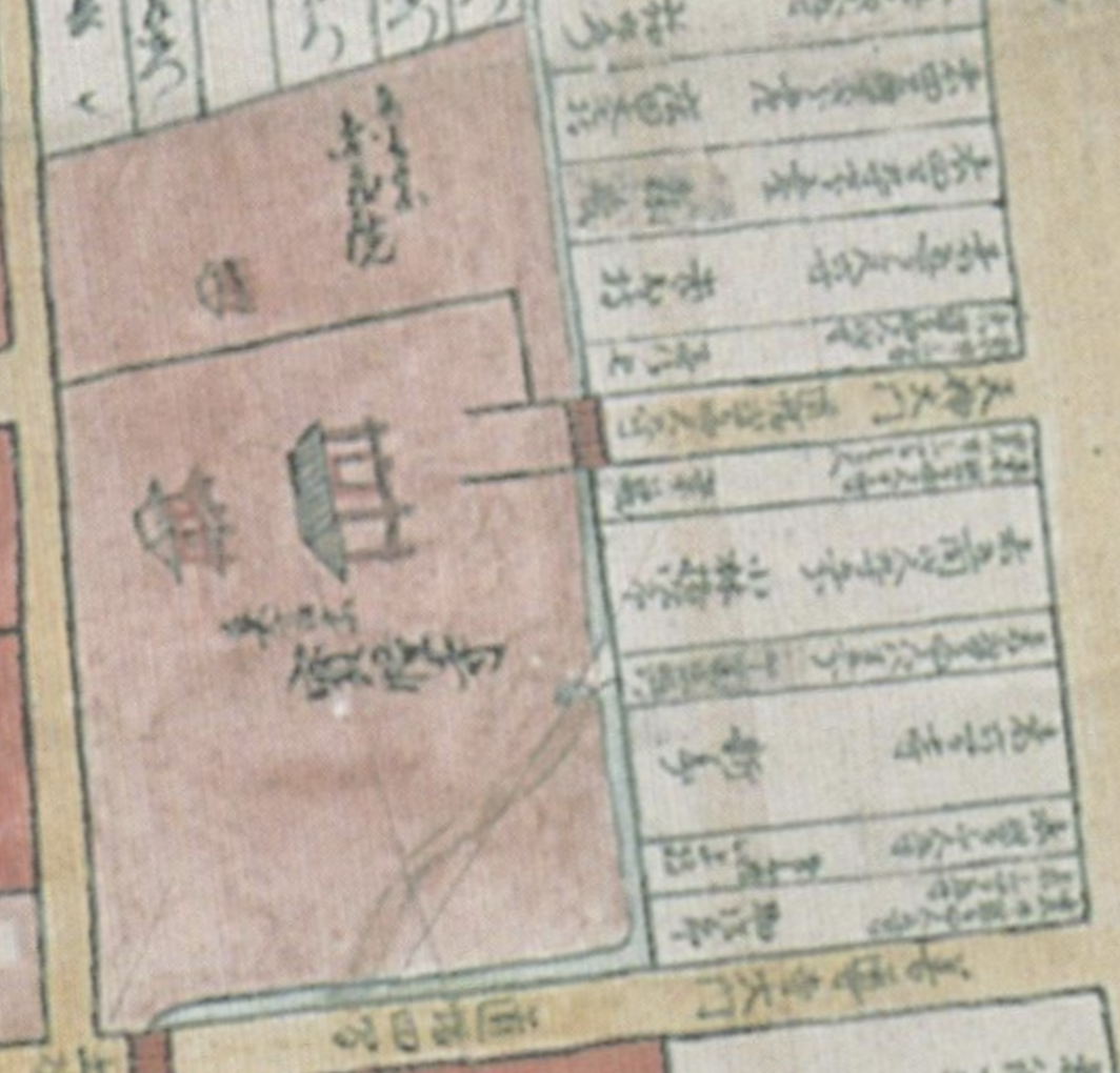 館林青梅天満宮 嘉永年間の青梅天満宮 嘉永元年館林城下地図より抜粋